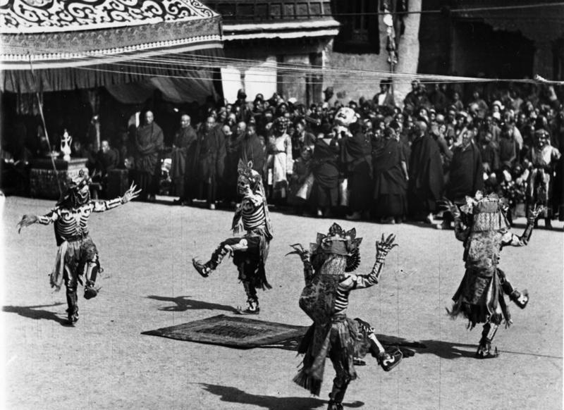 Lhasa, Kriegs-, Teufels- und Lamatänze anlässlich des heranrückenden Neujahrsfestes im Hofe des Potala